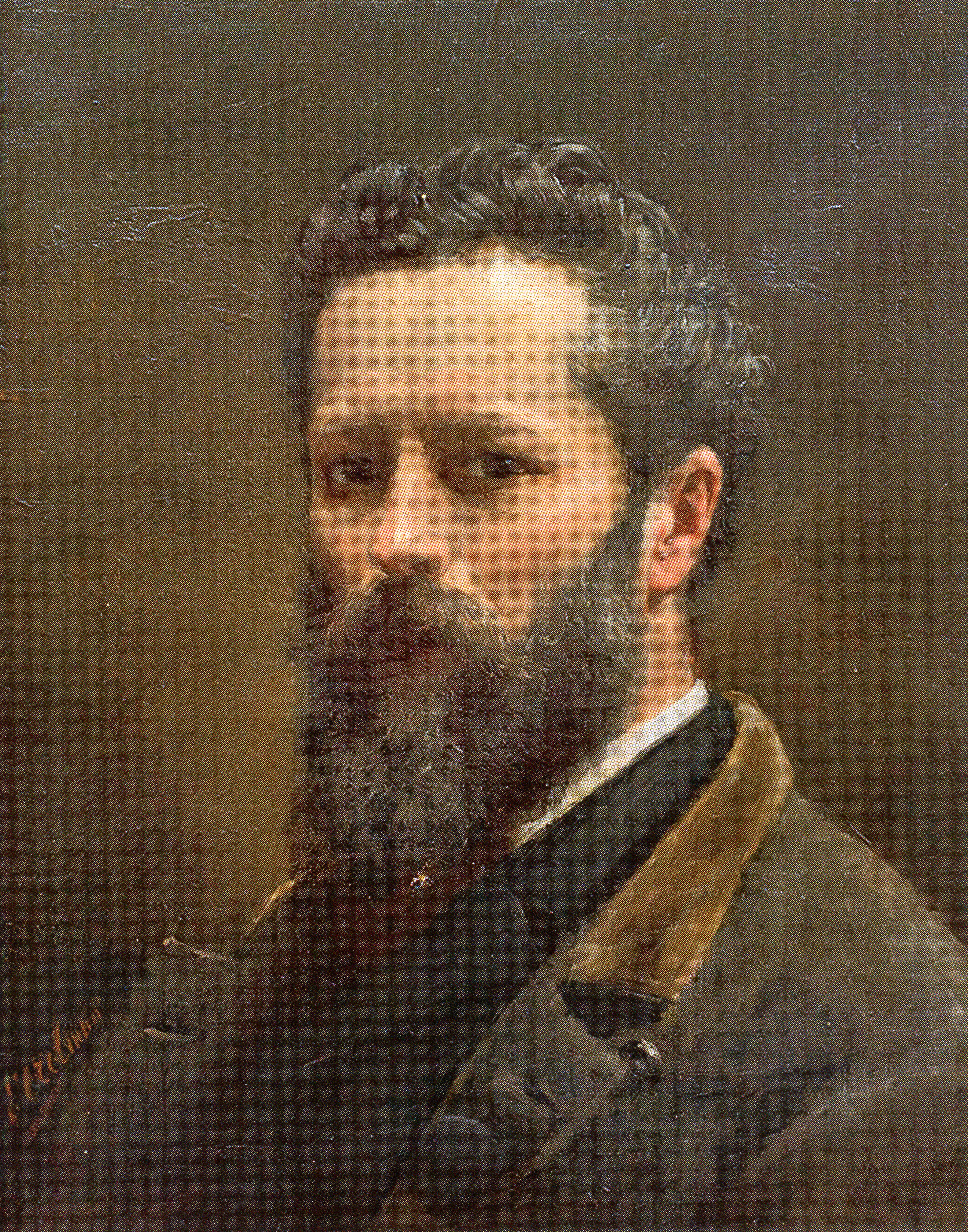 Detail van een zelfportret van Otto Eerelman